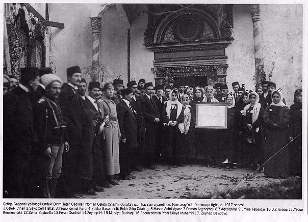 Участники Курултая крымских татар в Бахчисарайском дворце у Демир-капу